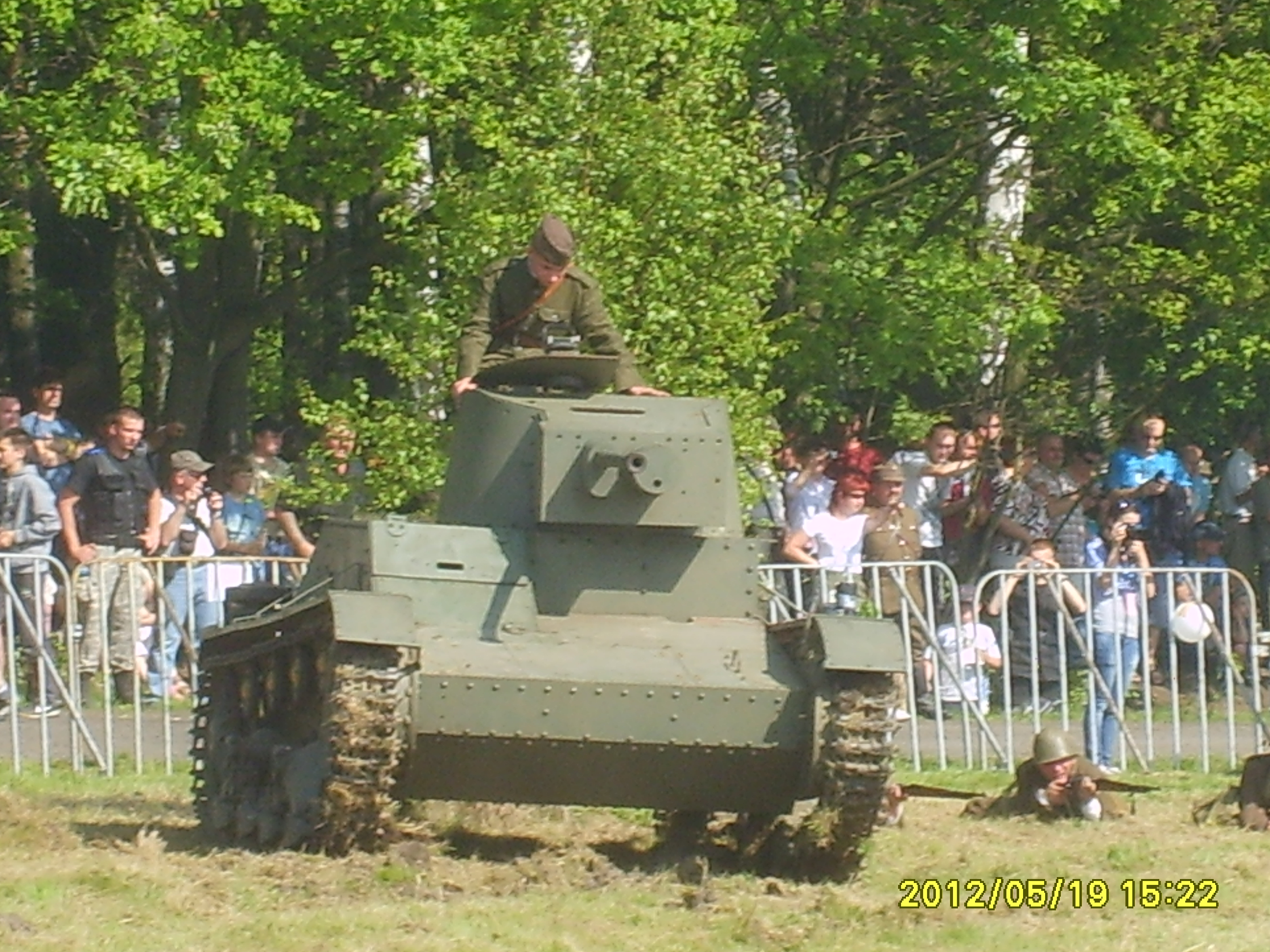 Zrekontruowany czołg 7TP podczas inscenizacji Bitwy Wyrskiej